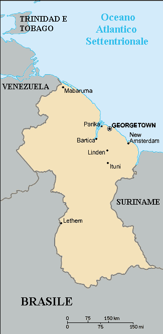 Guyana: mappa. Ripresa da Wiki inglese e italianizzata.